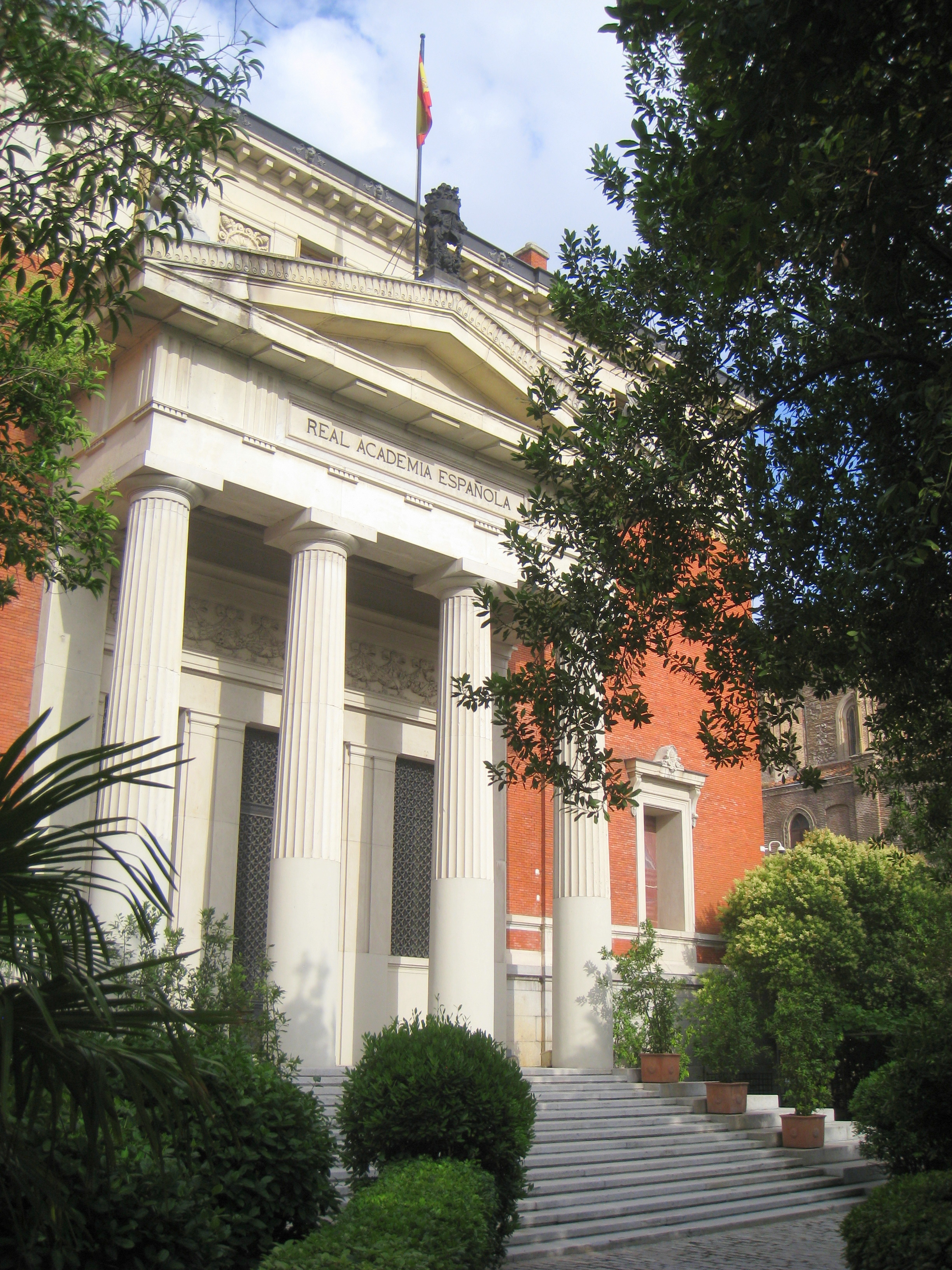 Real Academia Española building, Madrid, Spain.